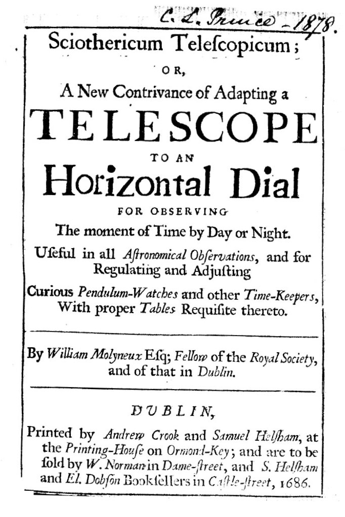 Frontespizio